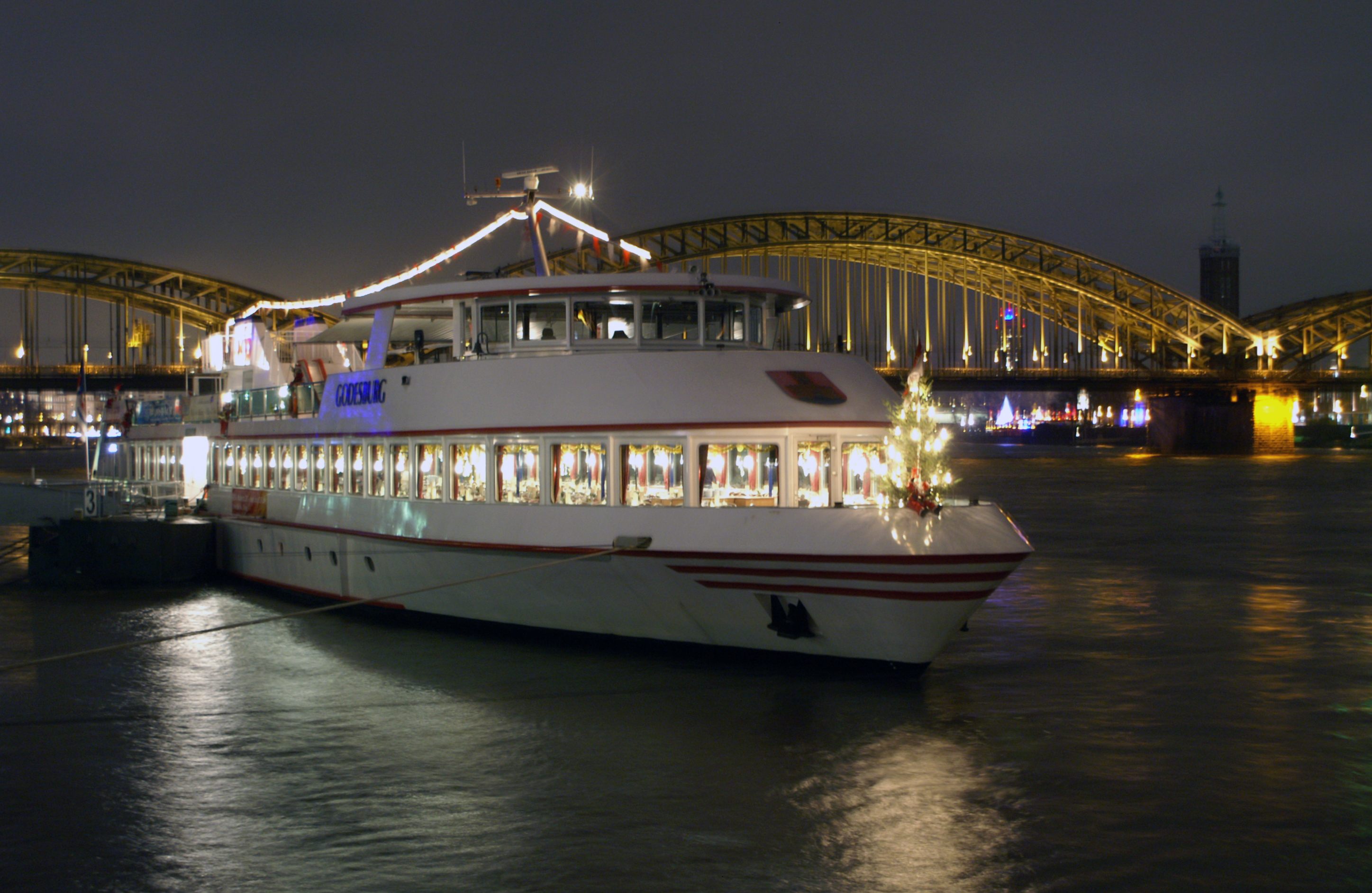 MS Godesburg abends in der Advendszeit am Anleger Köln.